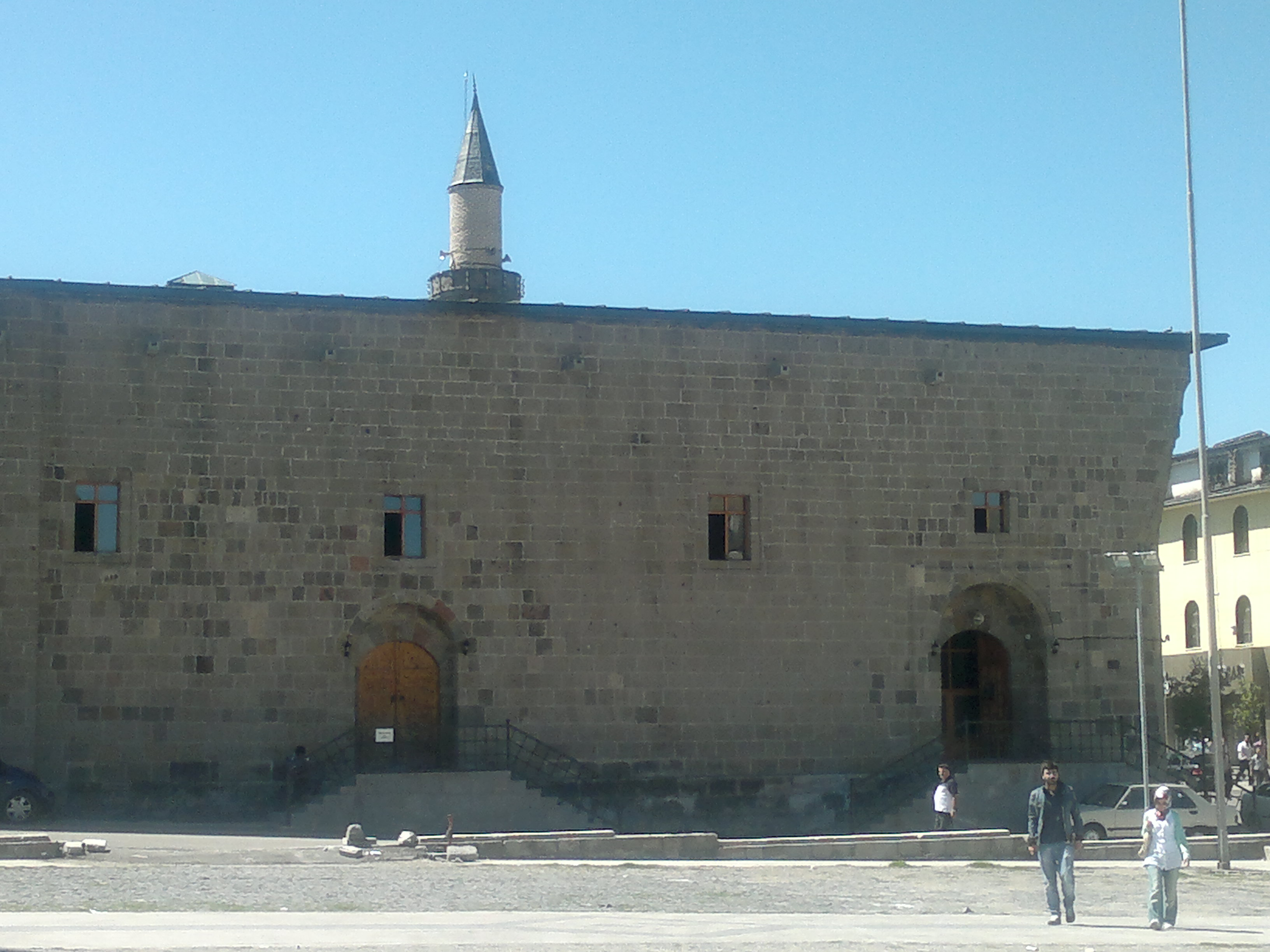 Erzurum Ulu Camii Doğu Cephe